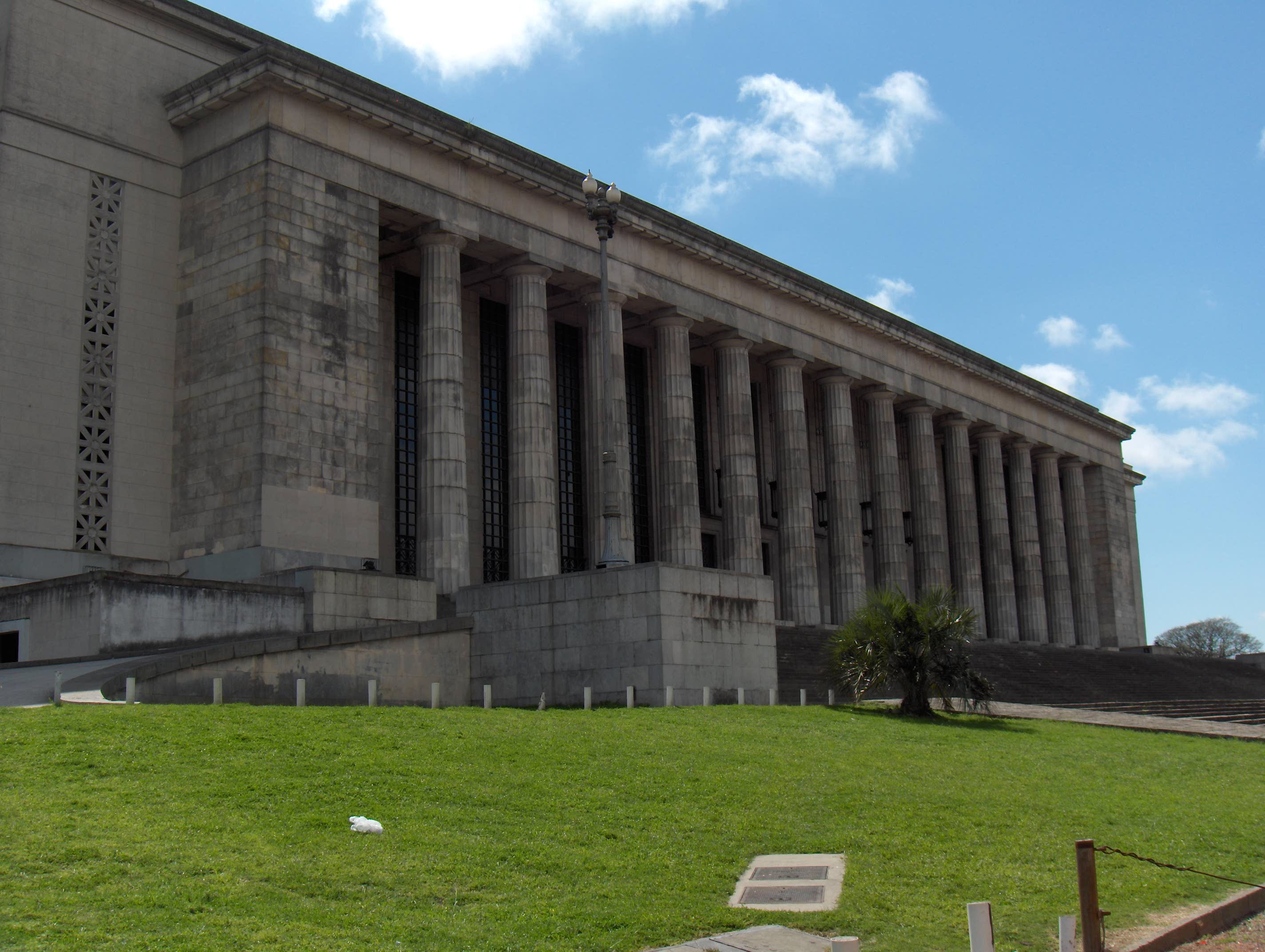 Edificio de la Facultad de Derecho de la Universidad de Buenos Aires, ubicado en el barrio de Recoleta